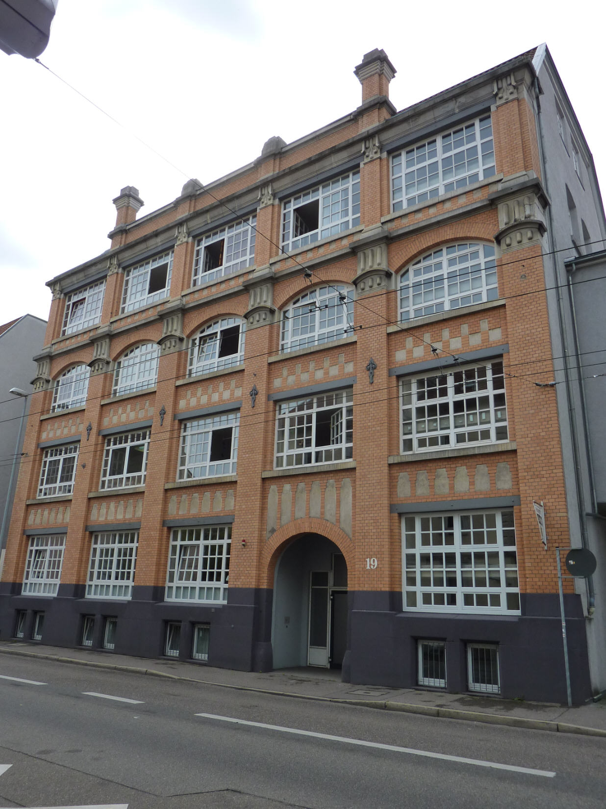 Fabrikgebäude Schelztorstraße 19 in Esslingen am Neckar; 1905 nach Enwurf des Architekten Hermann Falch erbaut; unter Denkmalschutz